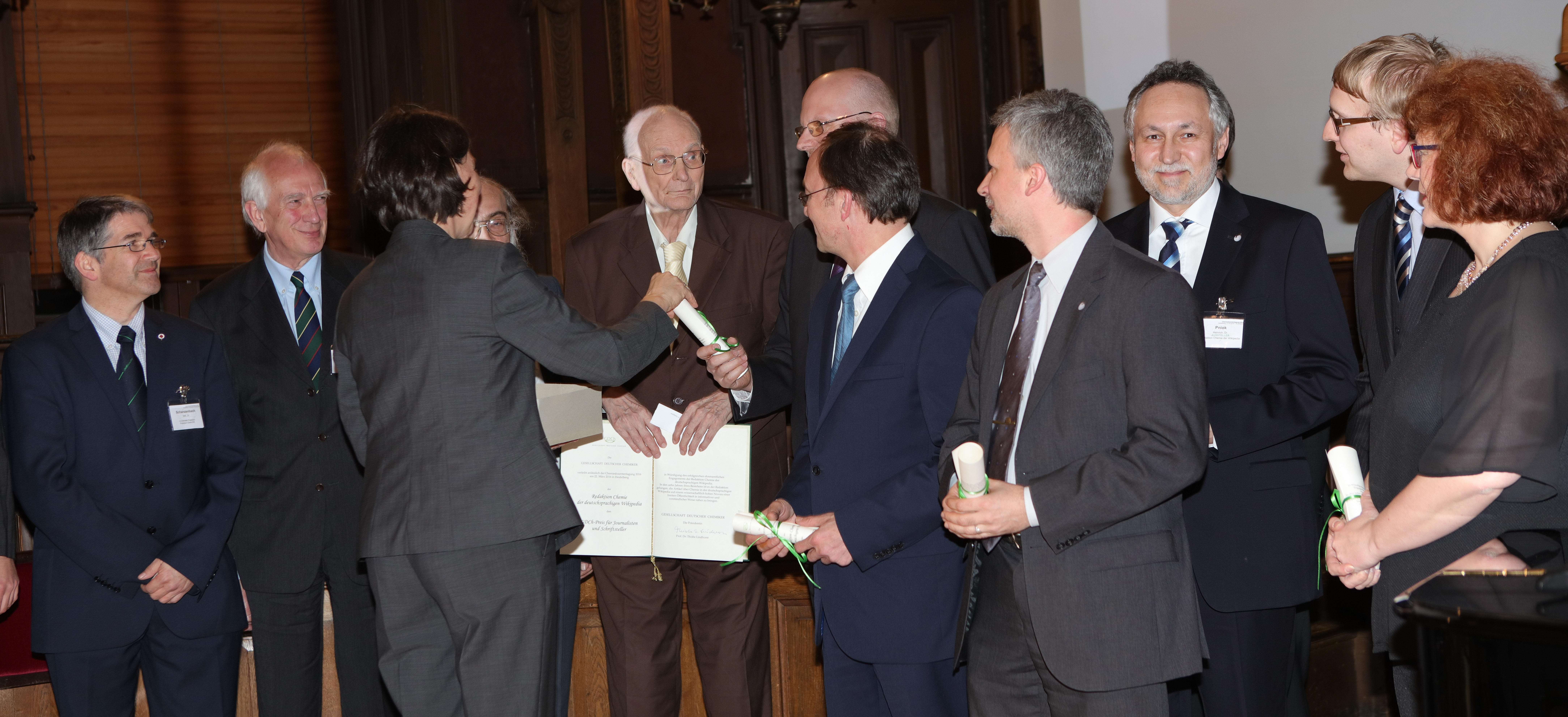 Verleihung des GDCh-Preises für Journalisten und Schriftsteller an die Redaktion Chemie der Wikipedia.